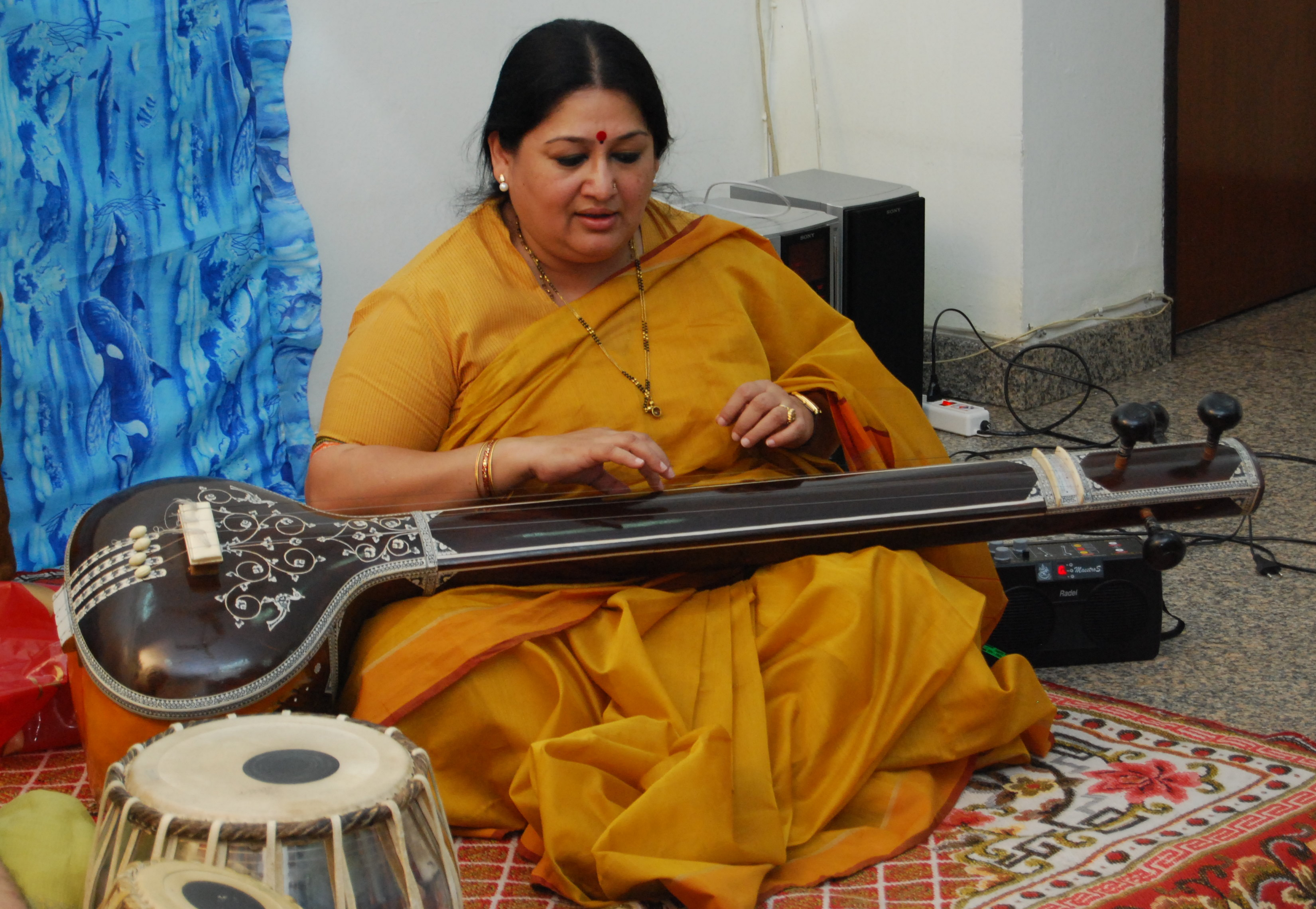 Shubha Mudgal playing hte tanpura